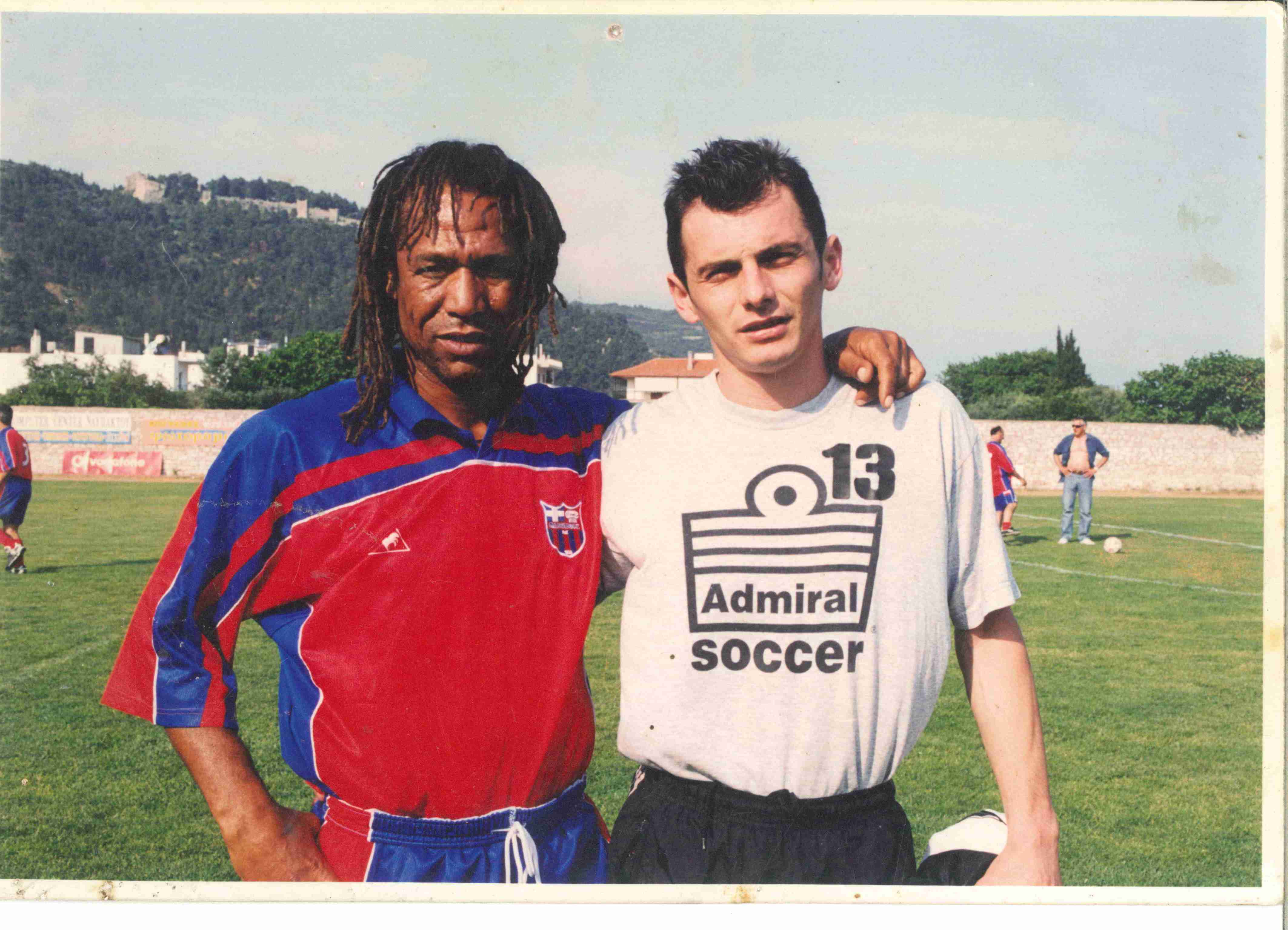 Mvskoke: O Νόνι Λίμα και ο Πάνος Κυριαζής